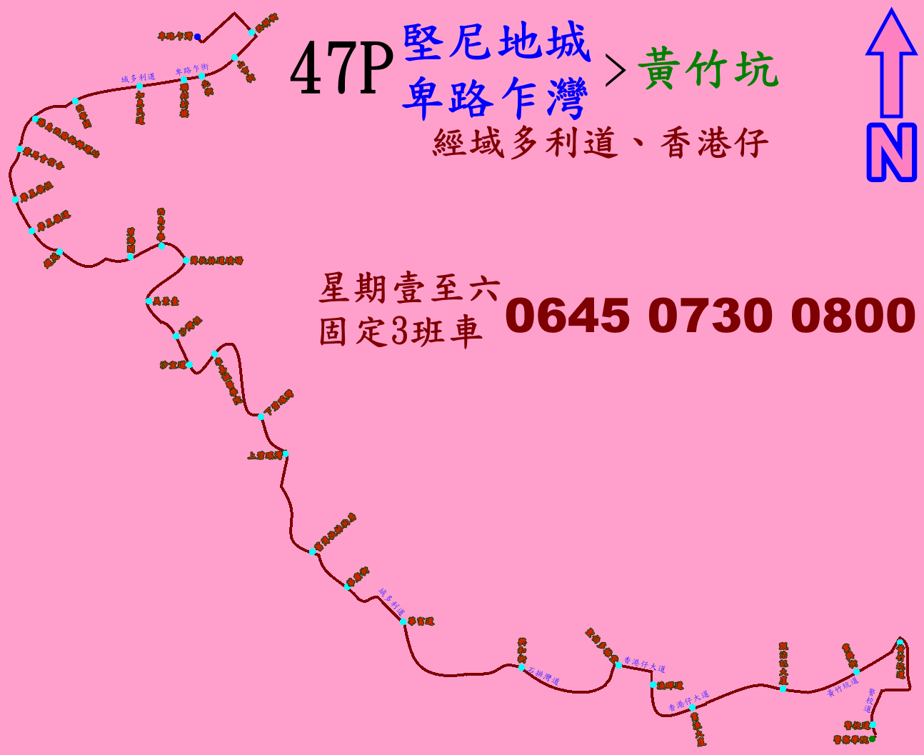 中文（香港）: 城巴47P線的走線圖